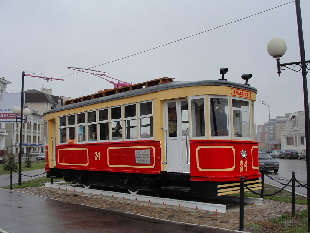 Музейный трамвай Х 24 в Казани